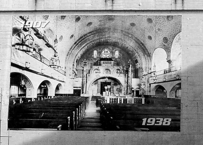 Fassade des Hochbunkers im Frankfurter Stadtteil Ostend, der in der Zeit des nationalsozialistischen Regimes anstelle der beim Novemberpogrom 1938 zerstörten Ostend-Synagoge errichtet wurde. Die Transparente auf der Fassade weisen auf eine Dauerausstellung zur Geschichte der Synagoge hin, das Foto auf dem größeren der beiden Transparente zeigt die Inneneinrichtung der zerstörten Synagoge.